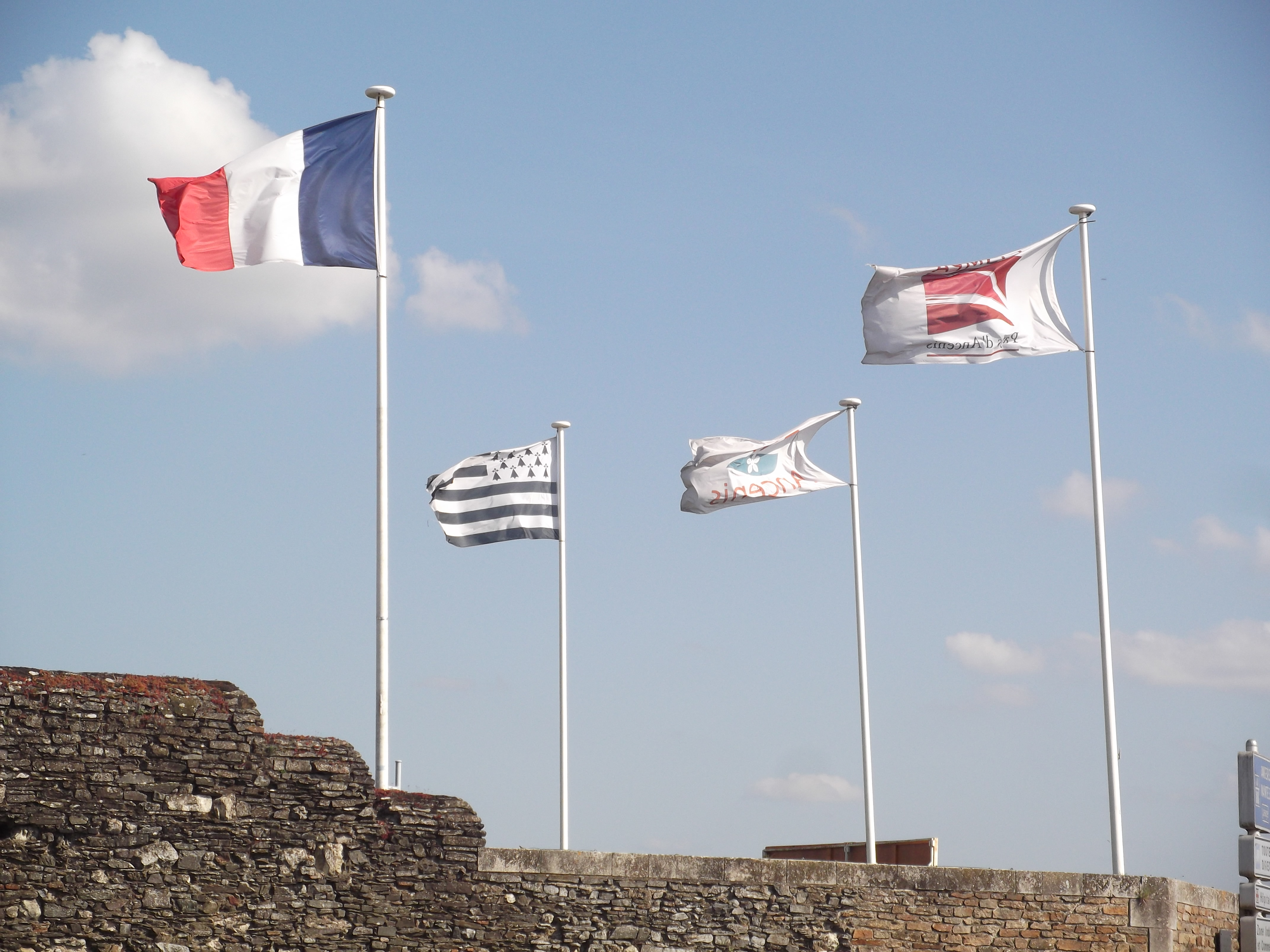 Drapeaux flottants au dessus du château d'Ancenis